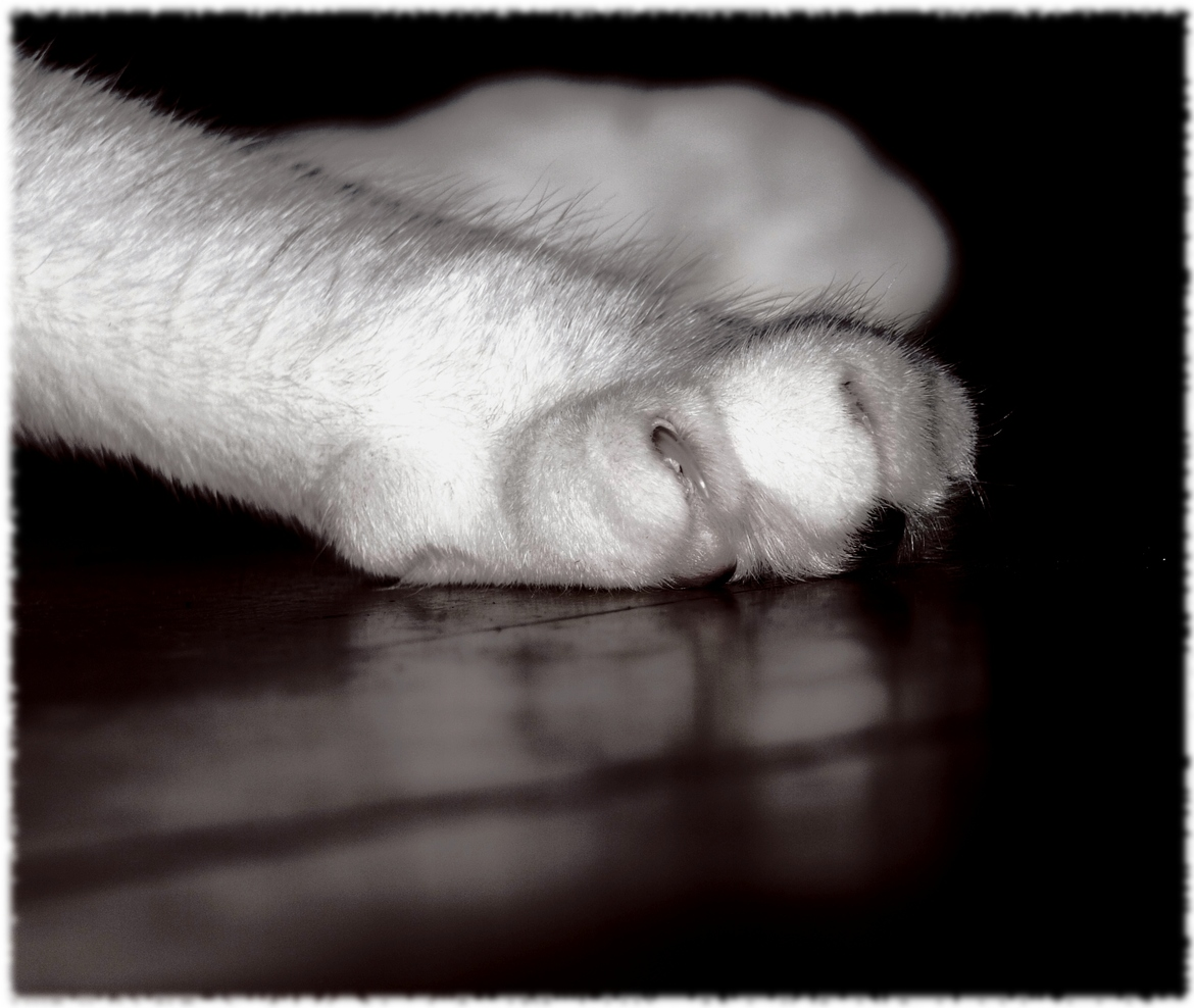 Когти у кота